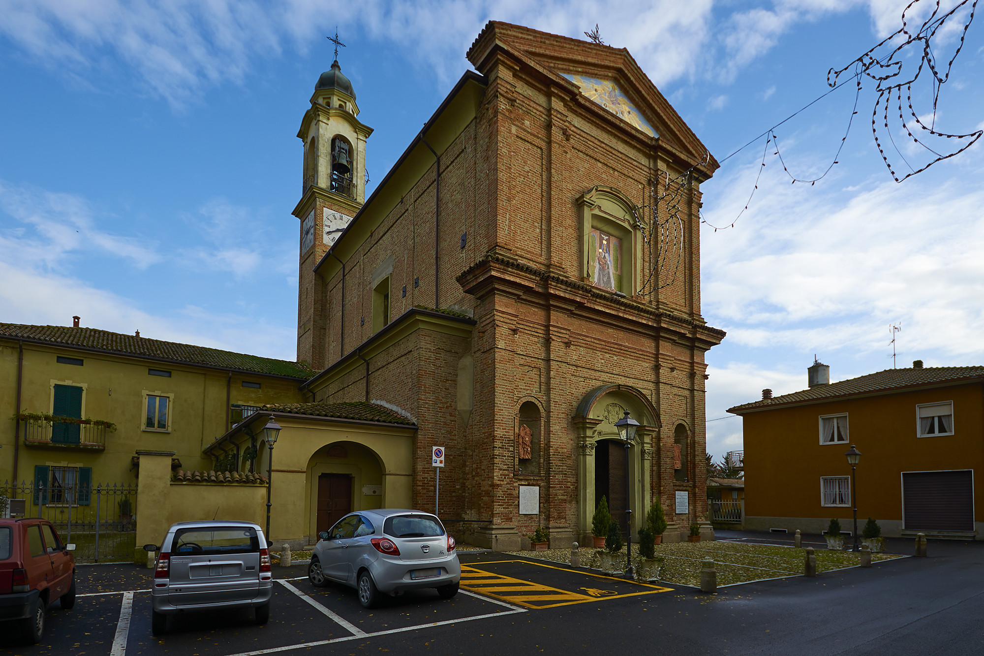 Chiesa della Madonna del Carmine